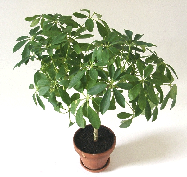 Paraplyaralia. Foto: Användare:Chrizz